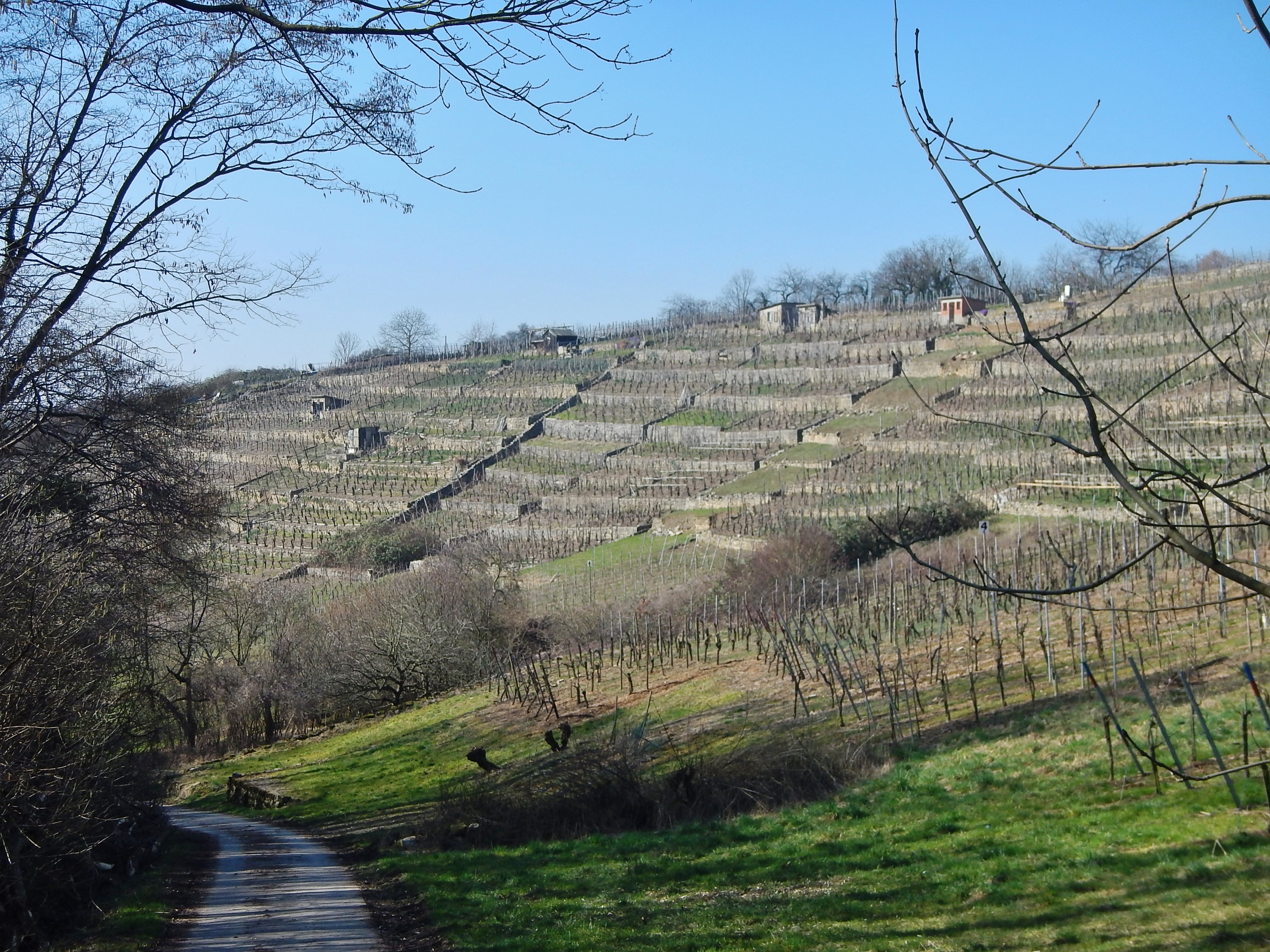 Enztalradweg mit Blick auf die Weinberge in Besigheim